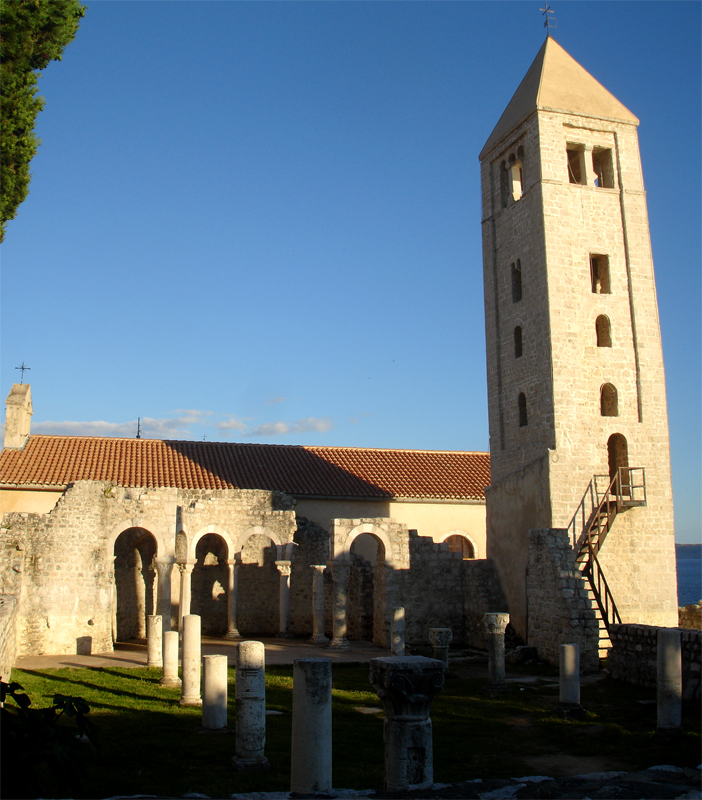 Rovine della chiesa di San Giovanni e campanile, Rab